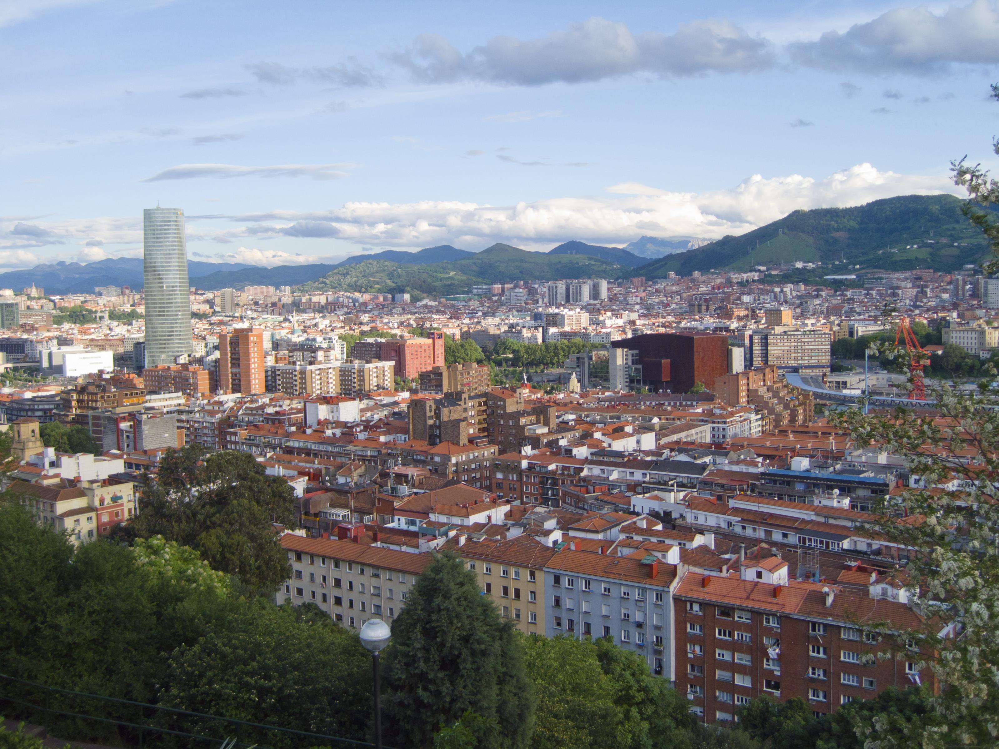 Deusto desde Arangoiti